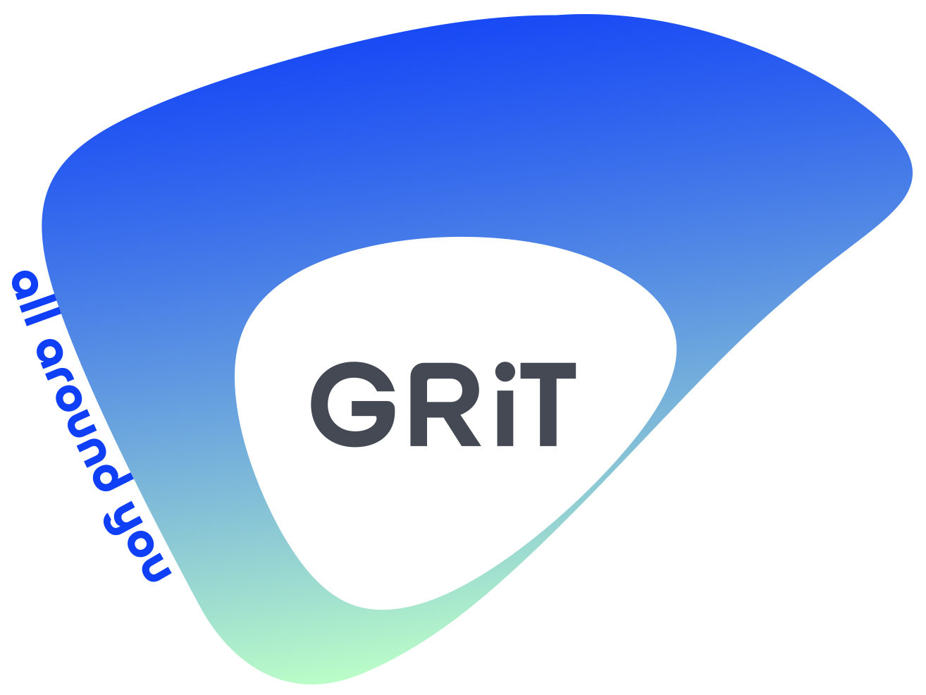 Logo GRiT